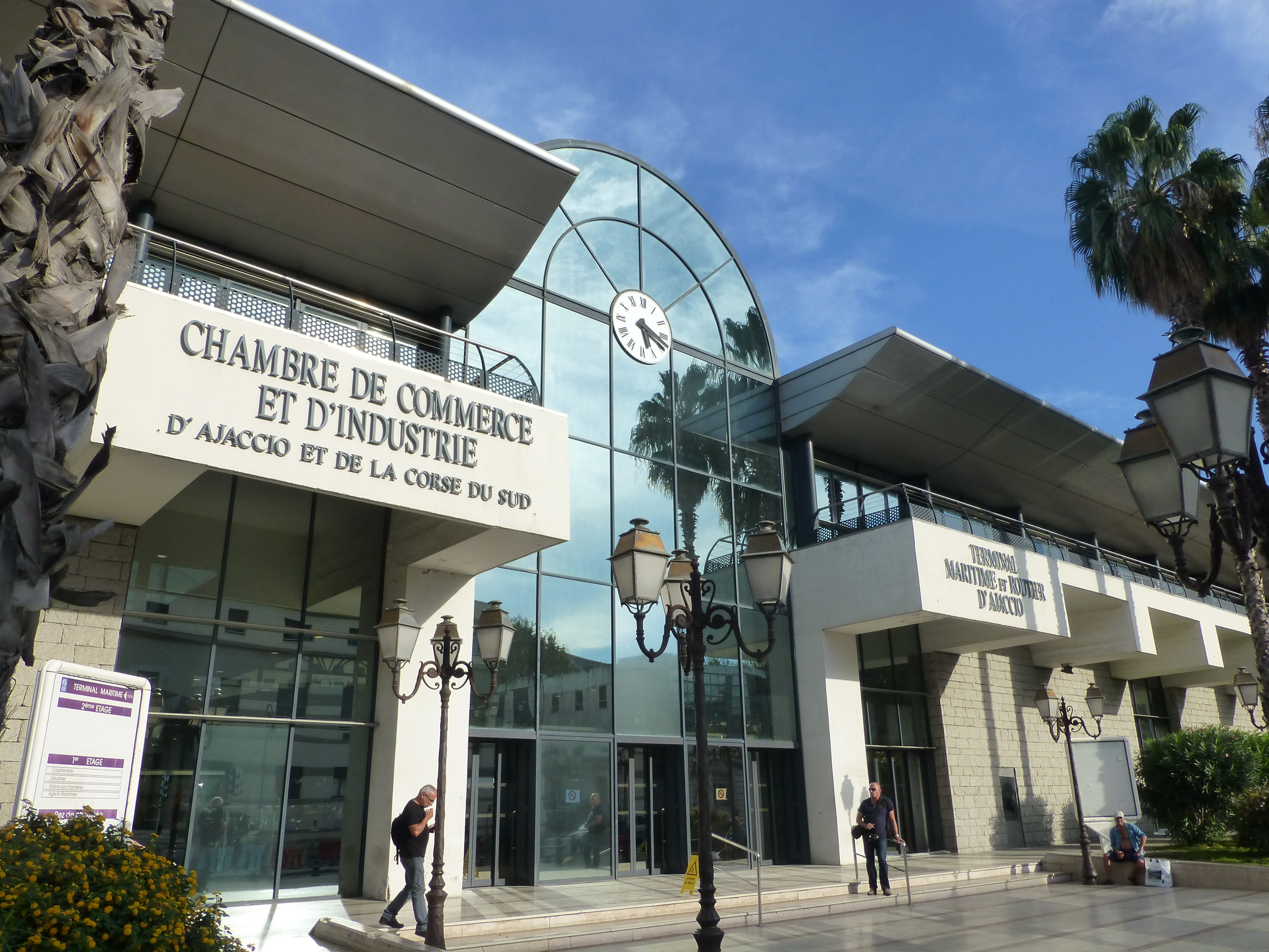 Korsika - Chambre de Commerce et d'Industrie de la Corse du Sud